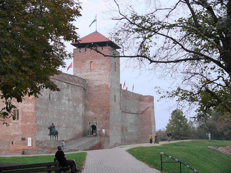 Gyula Vár nappal